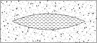 Примерный вид линзы